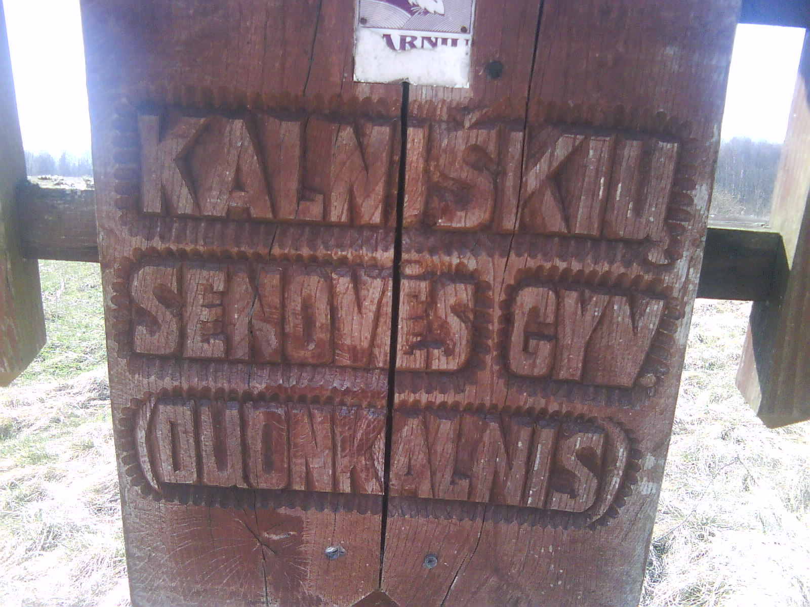 Duonkalnio paminklas